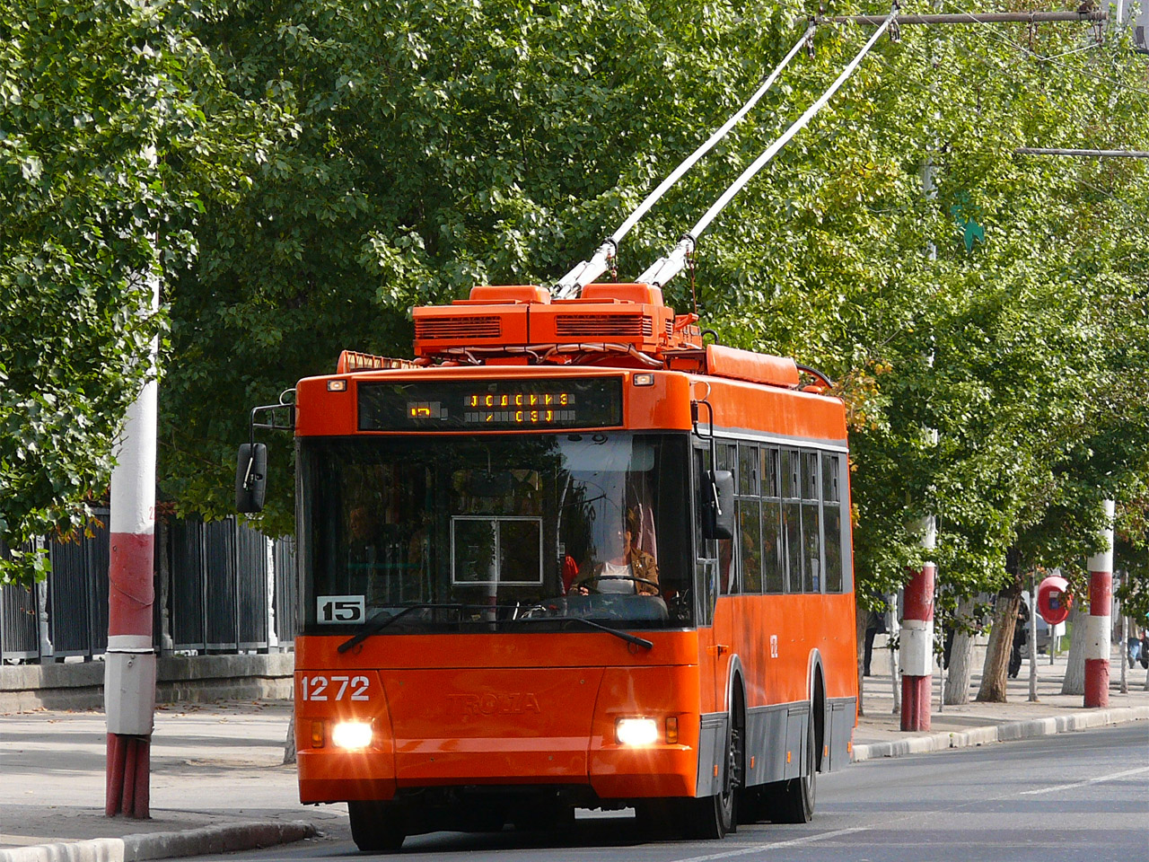 Тролза "Оптима" б\н 1272 в г. Саратов